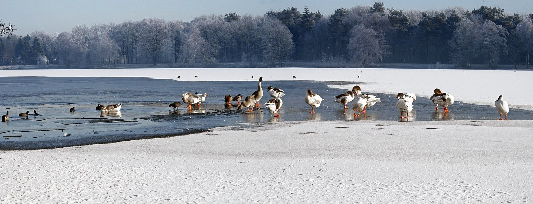 De Karpendonkse Plas, in Eindhoven (de buurt "Karpen" in Tongelre)